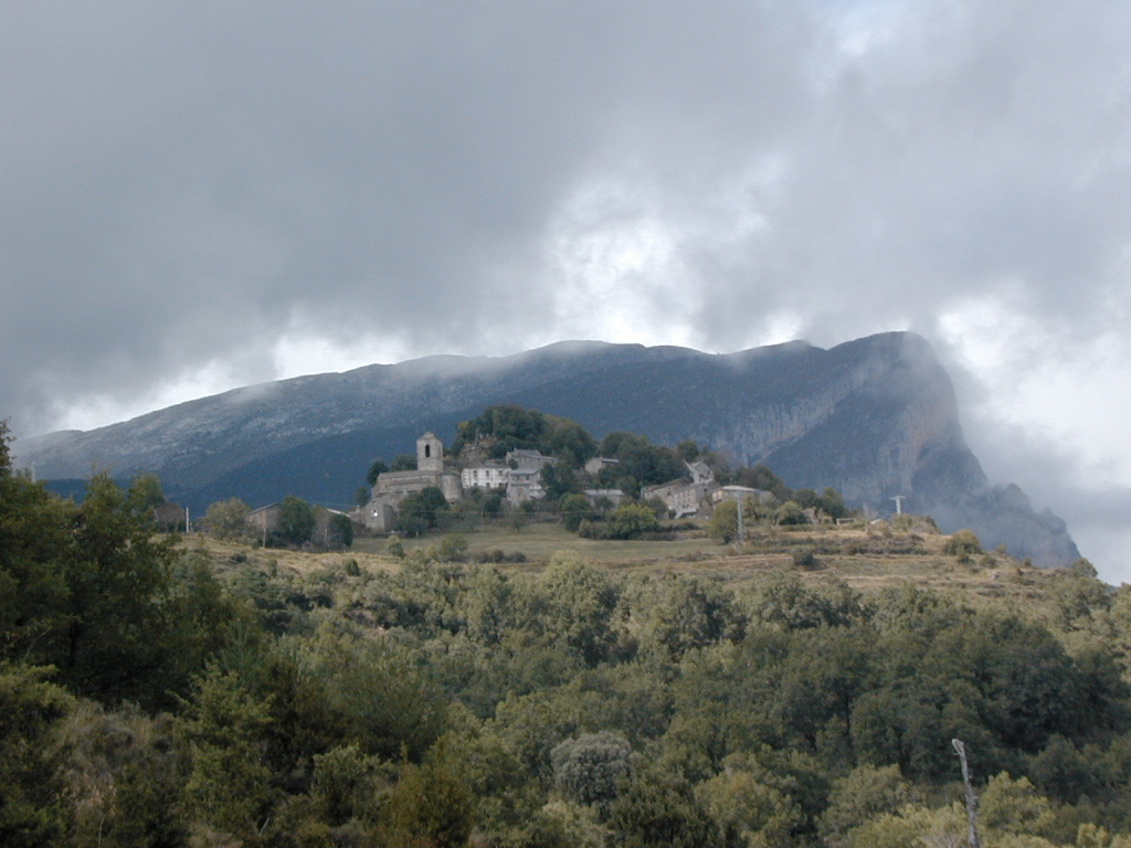 Vista de Puertolas con montaña al fondo